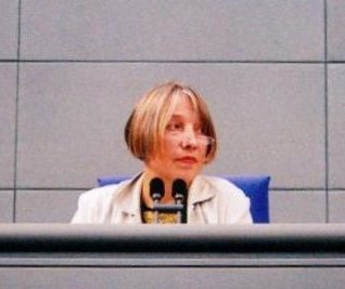 Antje Vollmer, deutsche Politikerin (Bündnis 90/Grüne), damalige Bundestagsvizepräsidentin, bei der Leitung einer Sitzung des Deutschen Bundestages.